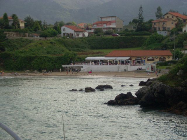 Beach of La Palombina, in Celoriu (Asturies, Spain) Vista parcial de la playa La Palombina, la más importante de la parroquia de Celoriu, con la sierra del Cuera al fondo.